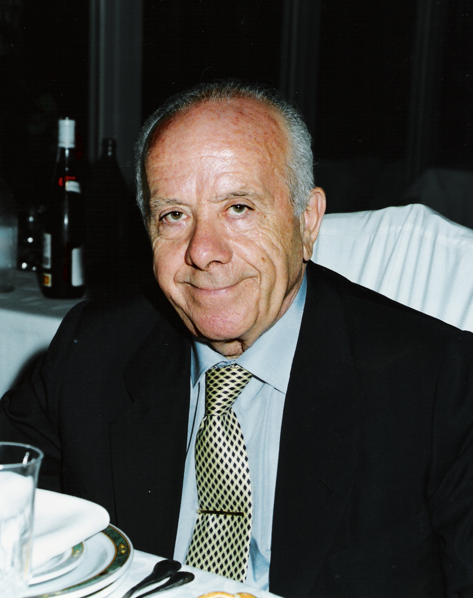 Francisco Camoiras